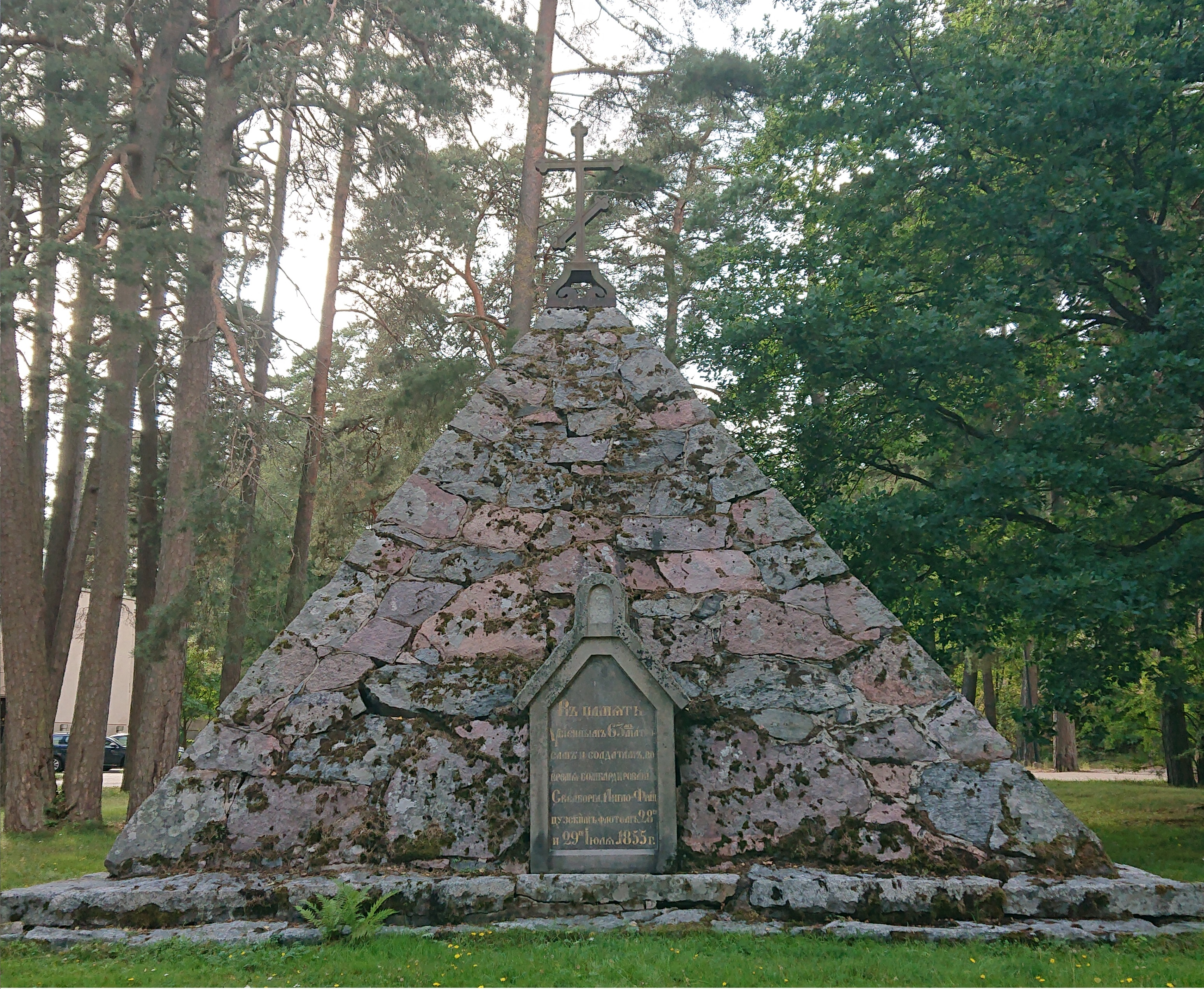 Viaporin pommituksessa kaatuneiden venäläisten matruusien muistomerkki Santahaminassa.